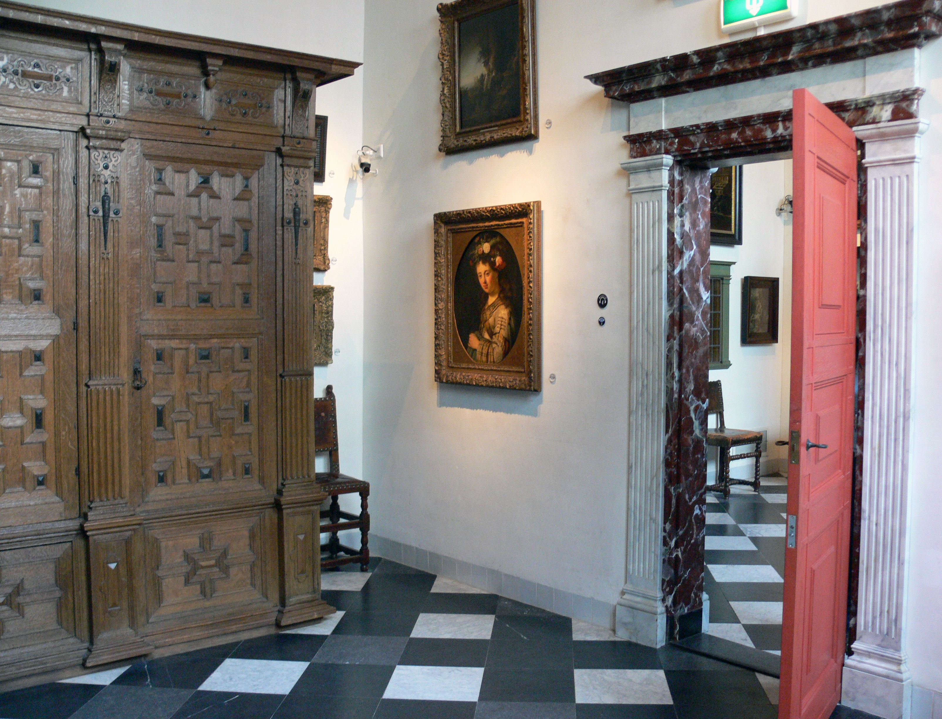 Amsterdam - Rembrandthuis - studio